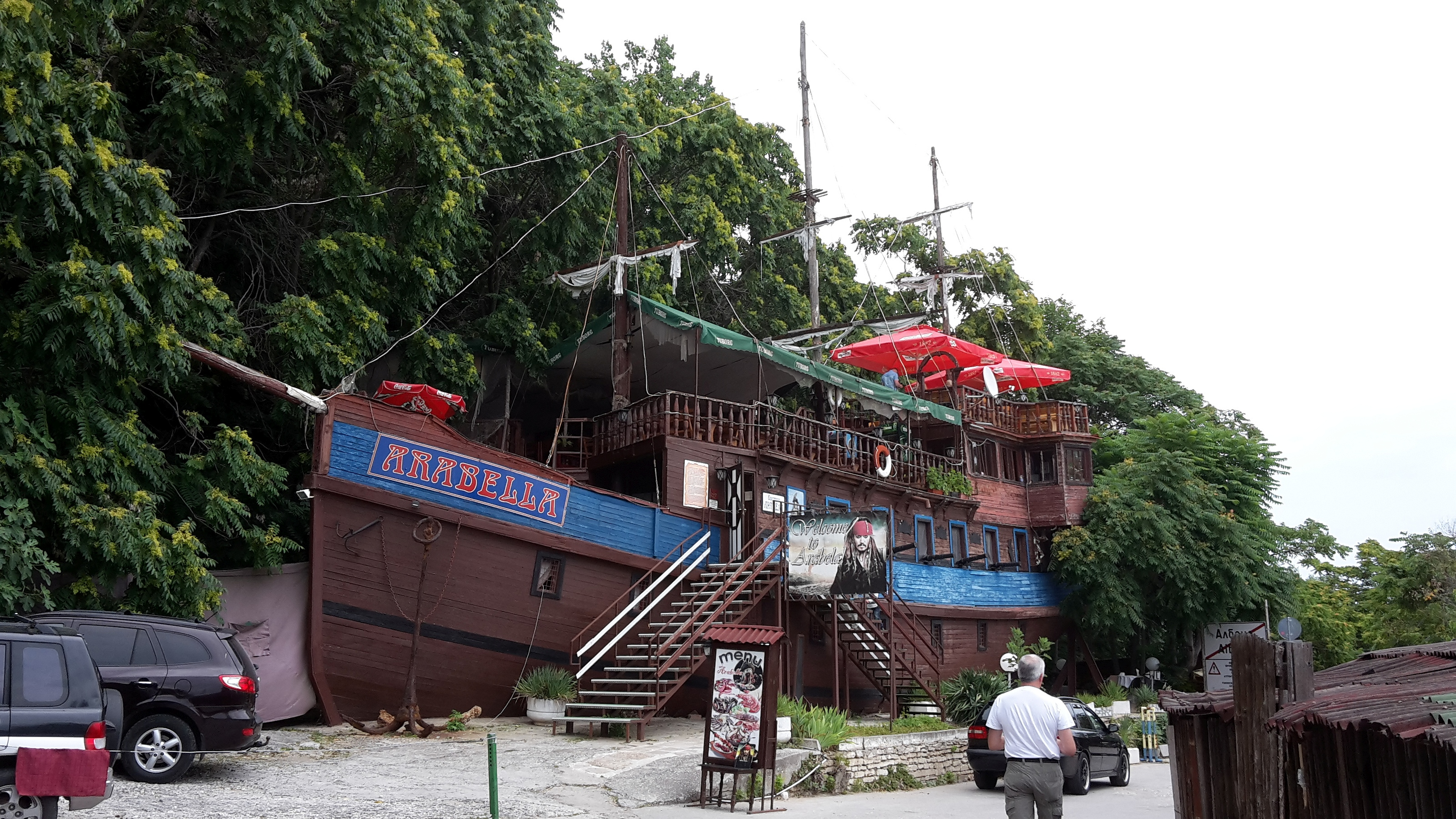 Dreimastschiff "Arabella" in Albena, Bulgarien. Der ehemalige Küstenfrachter wird als Restaurant genutzt.